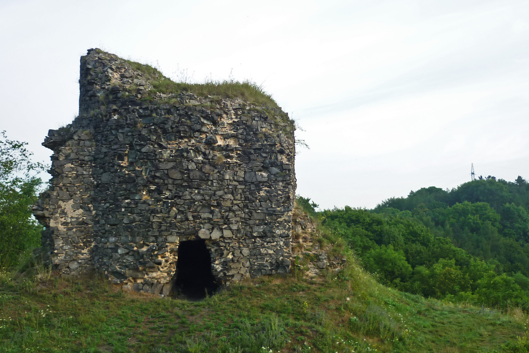 Burgruine Scharfenstein (Hrad Ostrý) bei Bensen (Benešov nad Ploučnicí), Reste der Oberburg